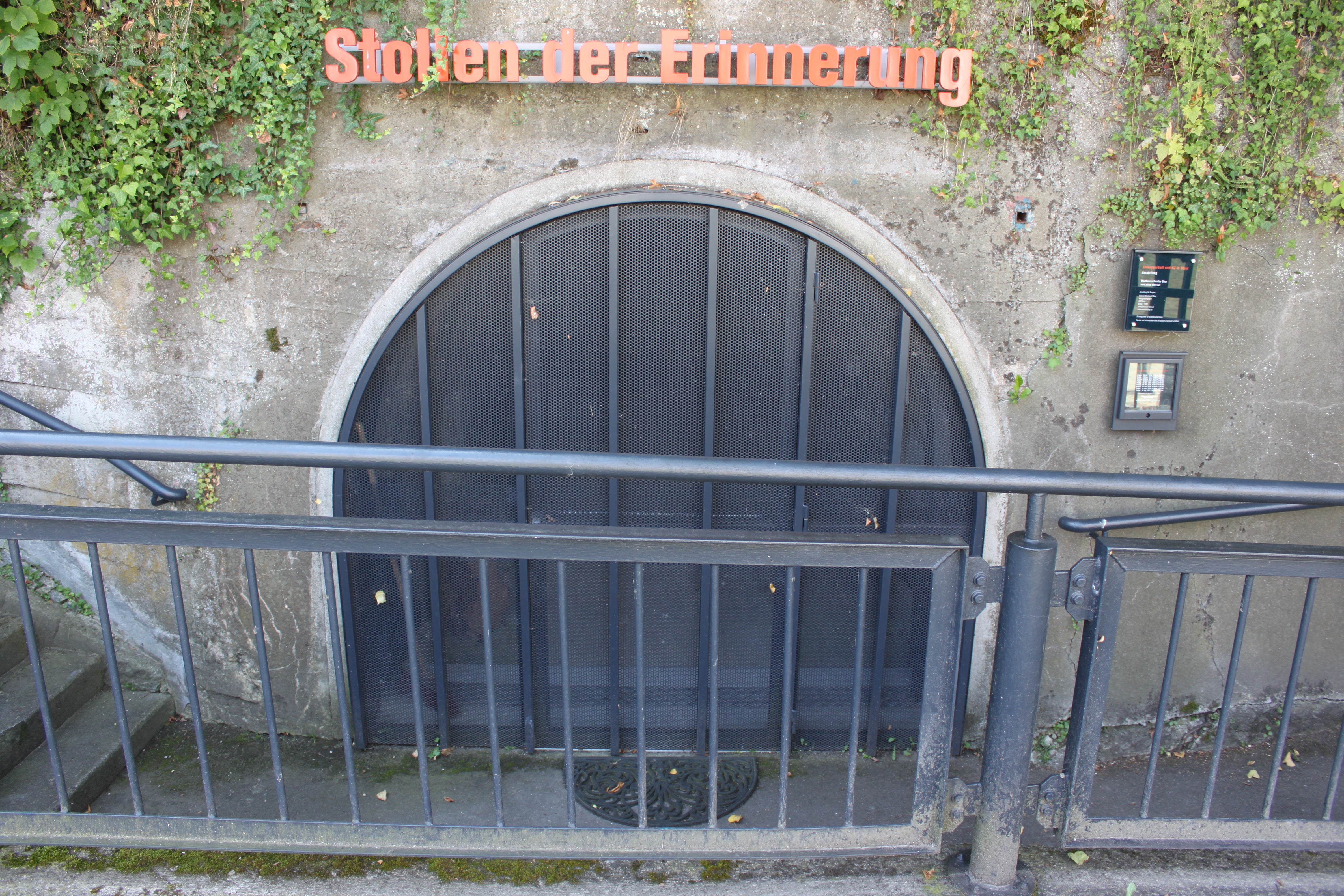 Stollen der Erinnerung, Eingangsportal, etwas abgesenkt hinter dem Uferweg am Fluss Steyr in der Stadt Steyr